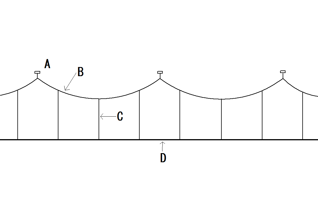 シンプル・カテナリ式の架線。A吊架線の支持点の碍子等、B吊架線、Cハンガー線、Dトロリー線。